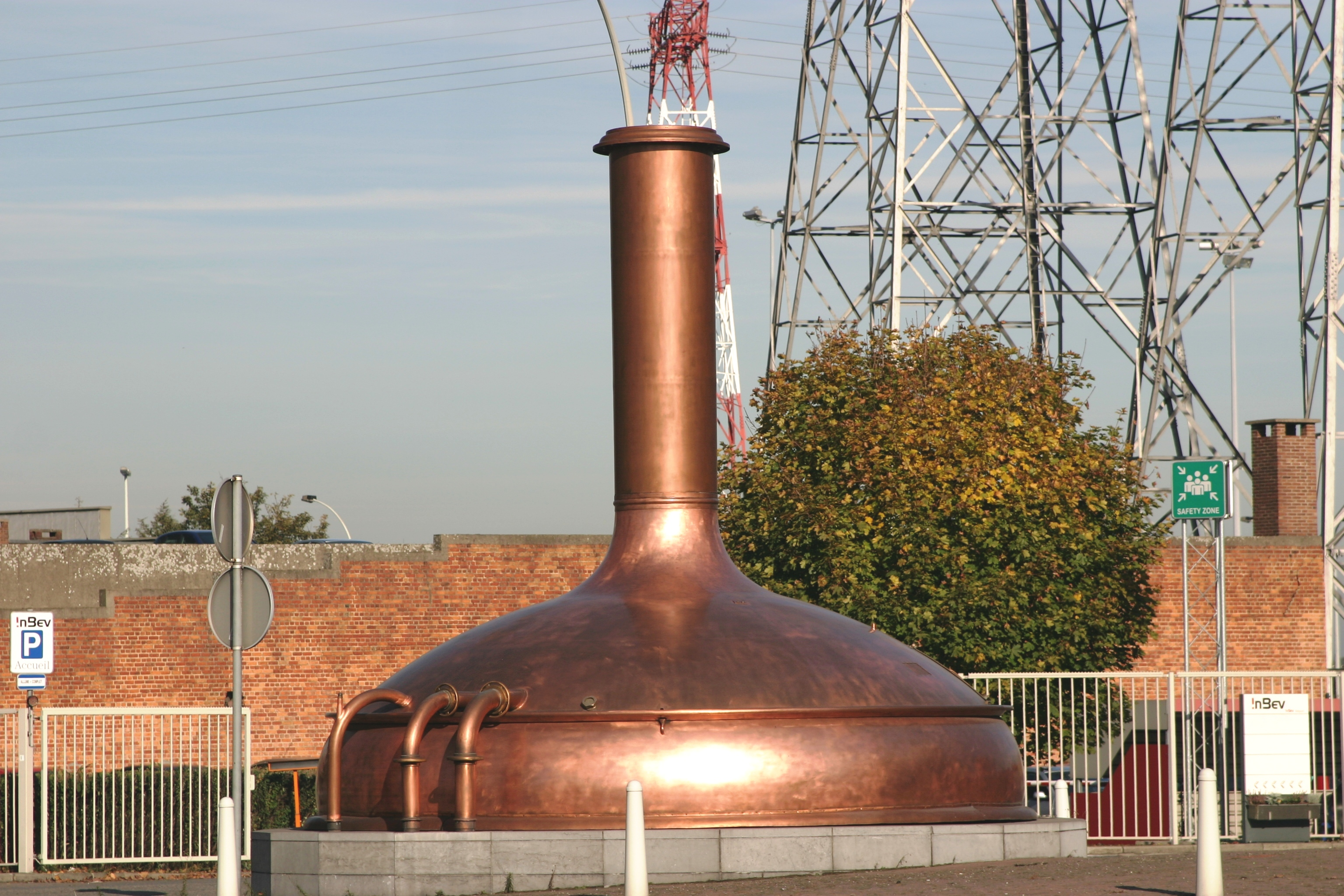 D'Kofferpaan um Rond-Point bei der Brauerei.